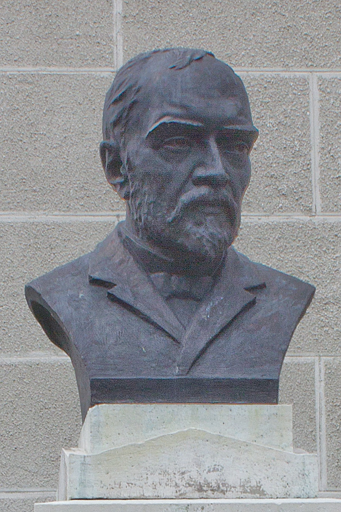 Büste von George Coșbuc (Schriftstelle) (1866-1918) in Arad (Rumänien).